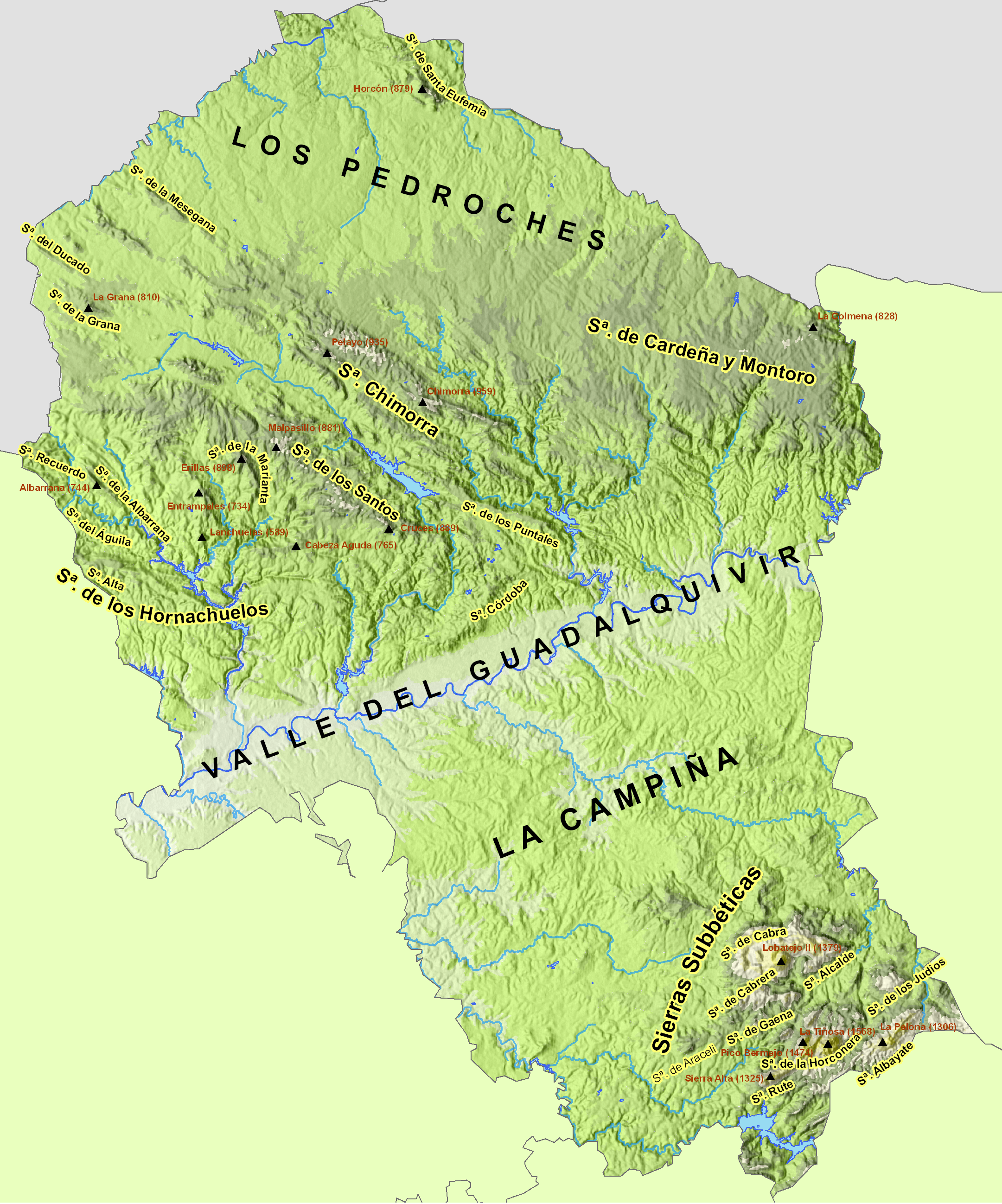 Mapa de relive de la provincia de Córdoba.